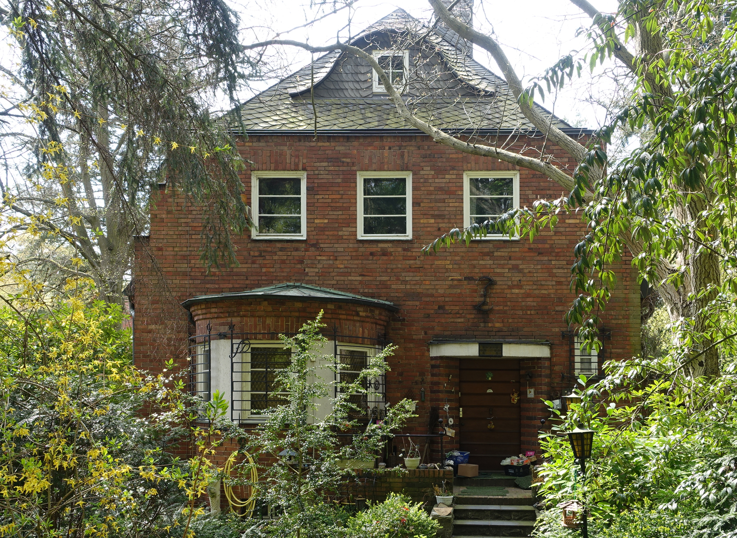 Wohnhaus